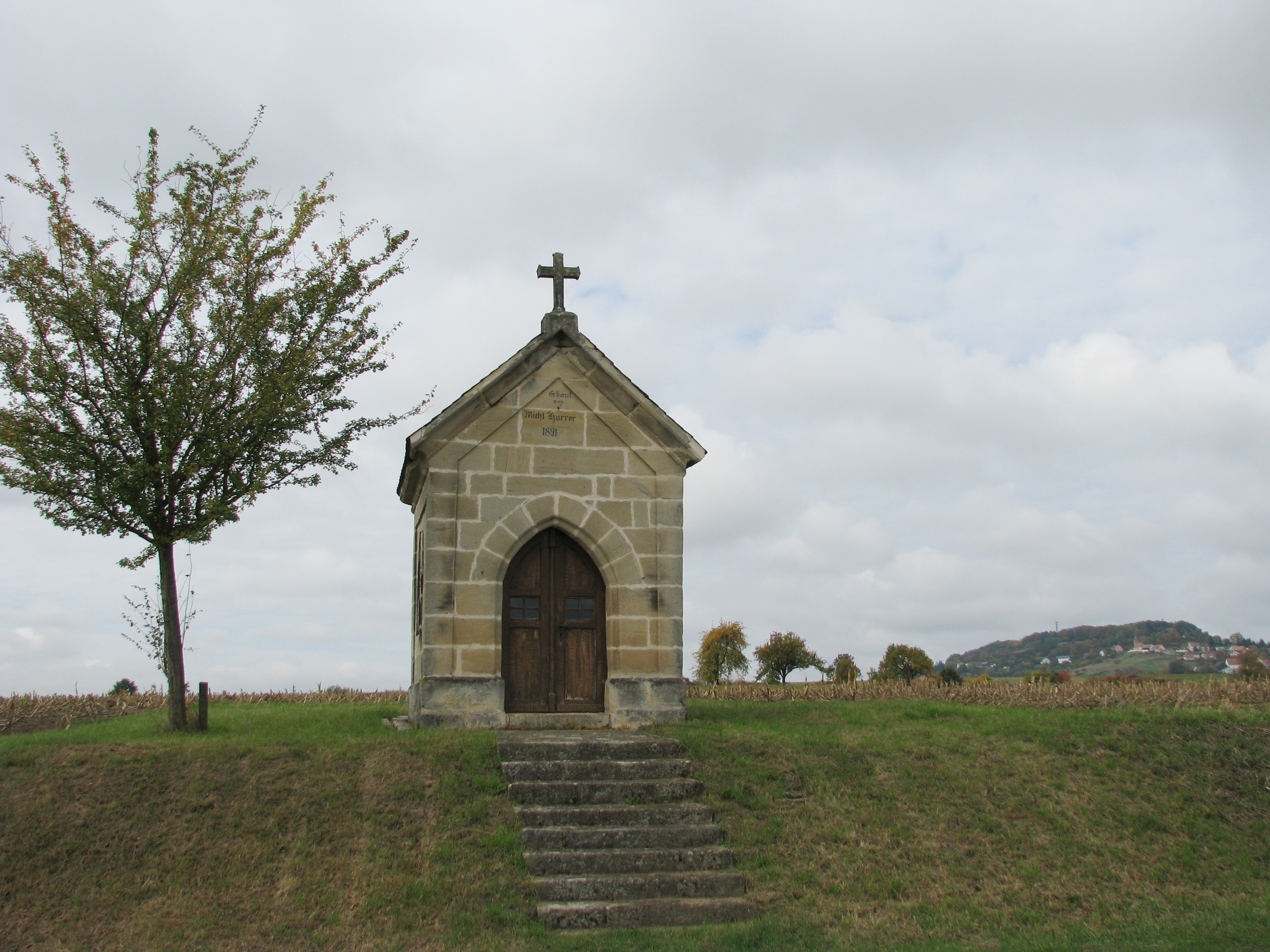 Laibstadt, Ortsteil von Heideck im mittelfränkischen Landkreis Roth, Kapelle von 1891 am Ortsrand